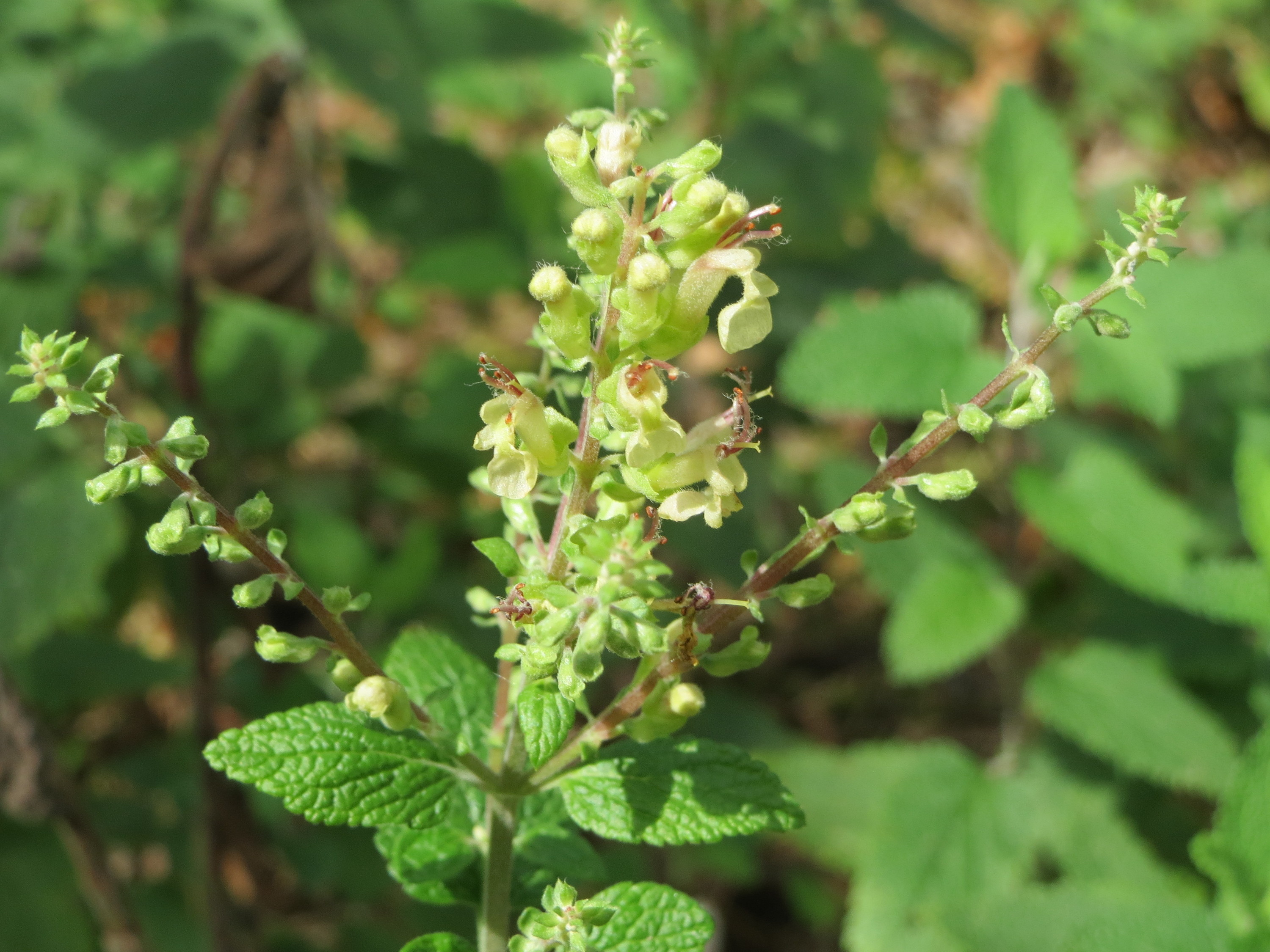 Salbei-Gamander (Teucrium scorodonia) im Schwetzinger Hardt